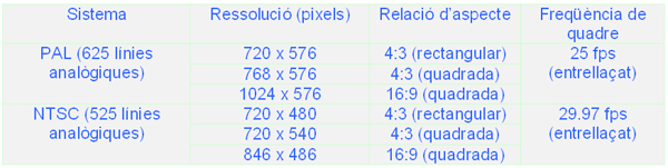 Taula que mostra els diferents formats de definicio espacial